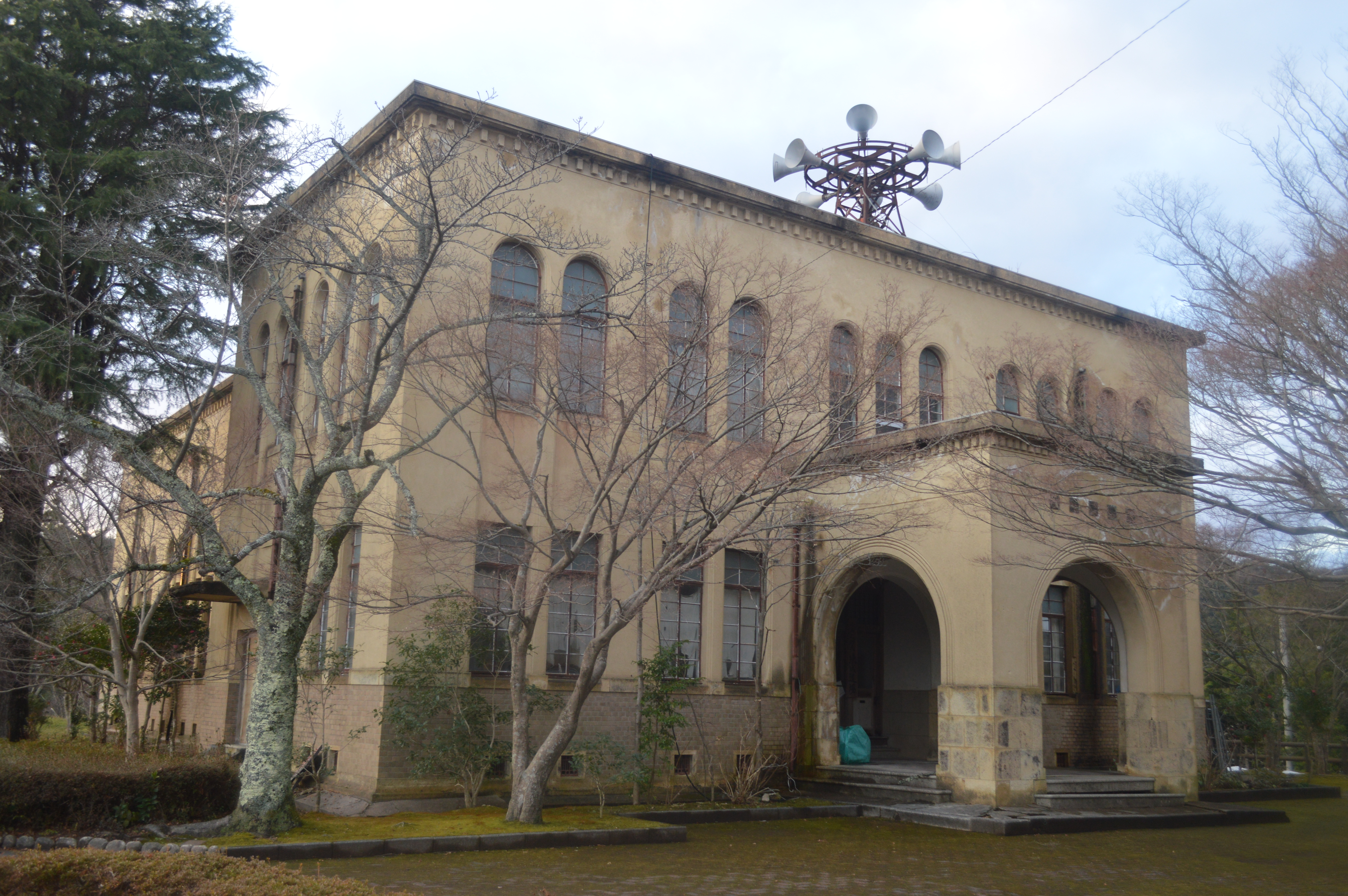 京都府京丹後市峰山町にある丹後震災記念館。